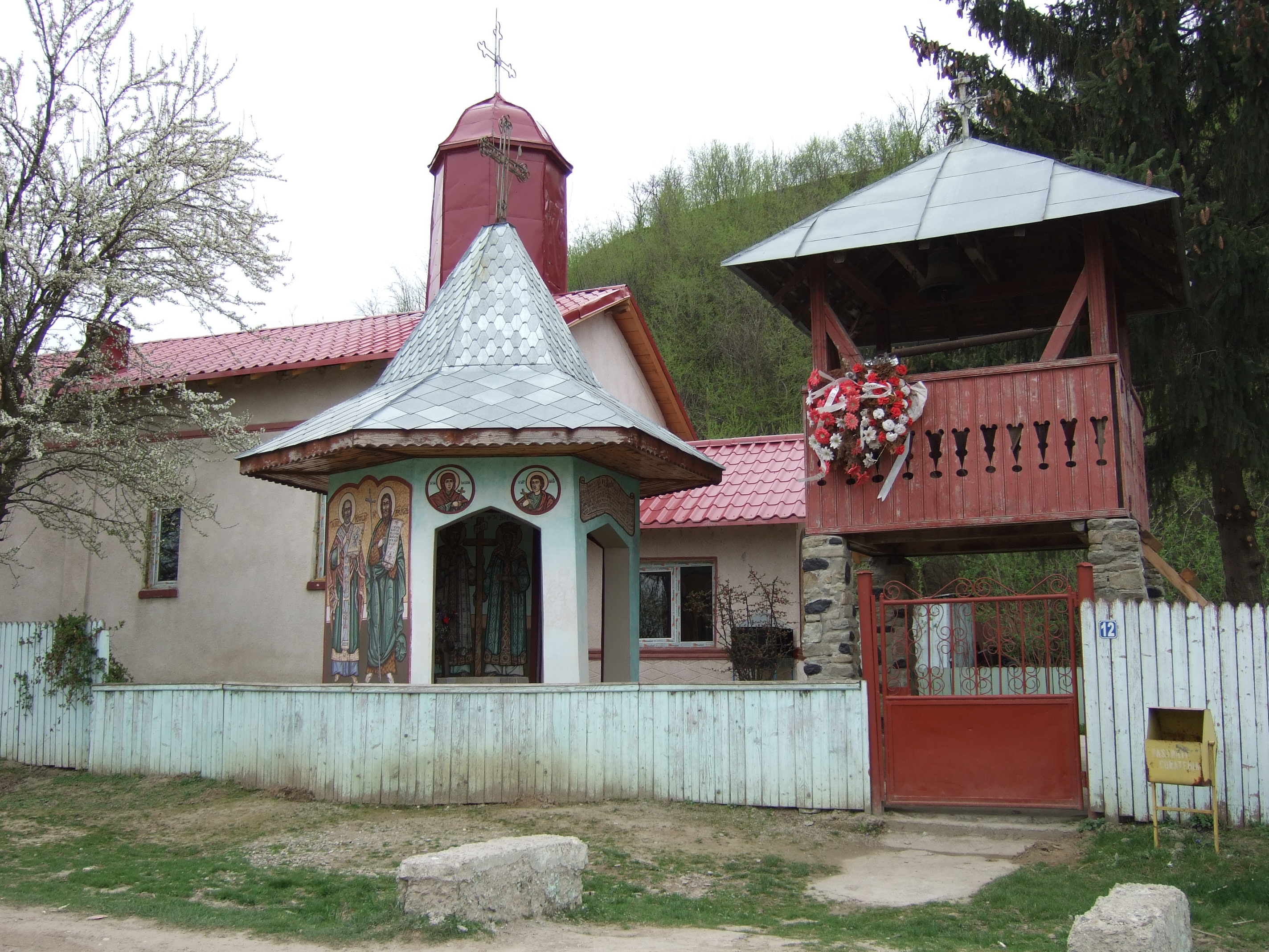 Troita,Clopotnita si Biserica din Barbatescu 1948